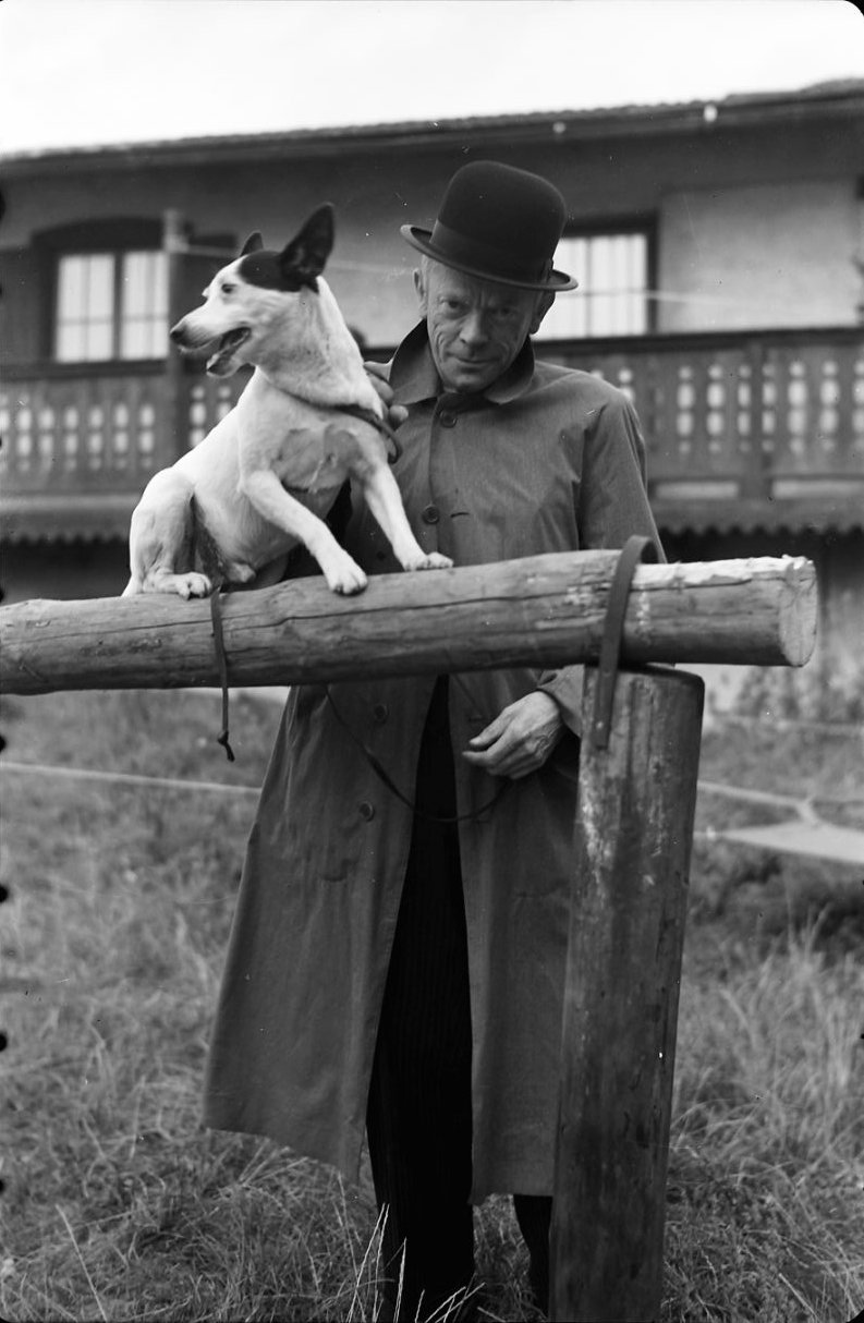 Berlin-Marienfelde: Karl Valentin mit seinem Hund Bopsi in einer Drehpause zu dem Film Donner, Blitz und Sonnenschein